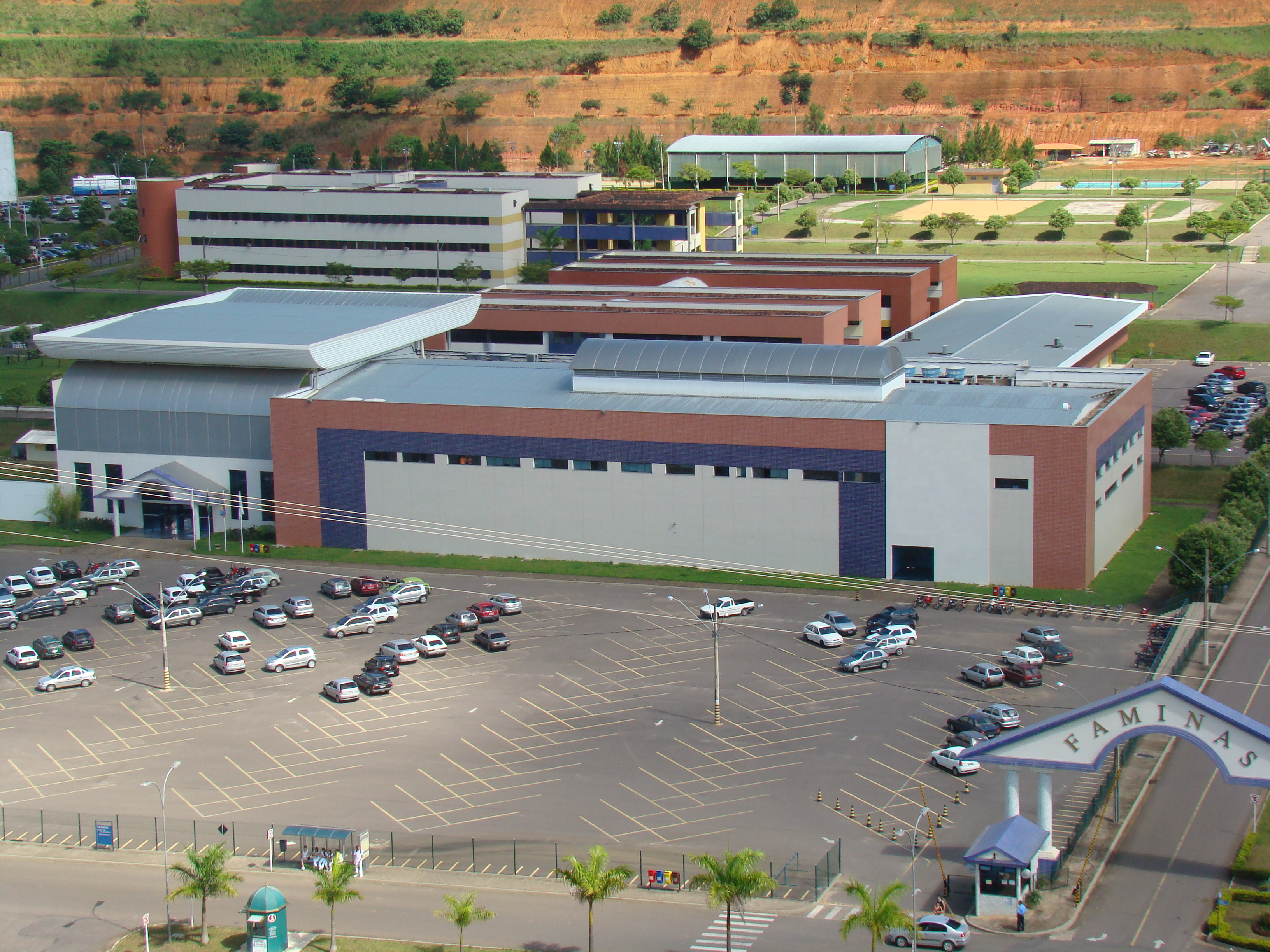 Vista panorâmica da FAMINAS - Muriaé